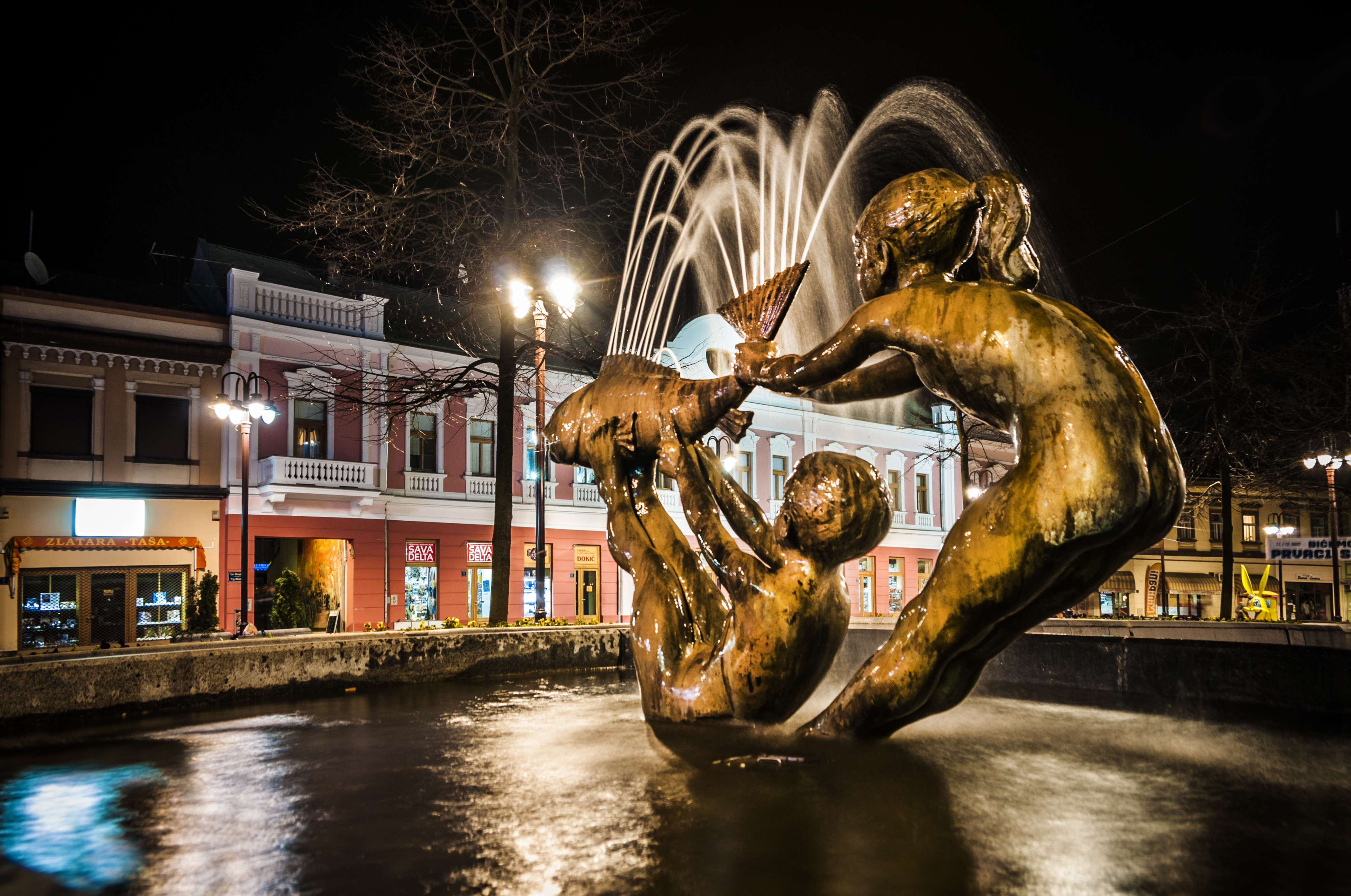 Brcko distrikt BiH - Fontana mladosti